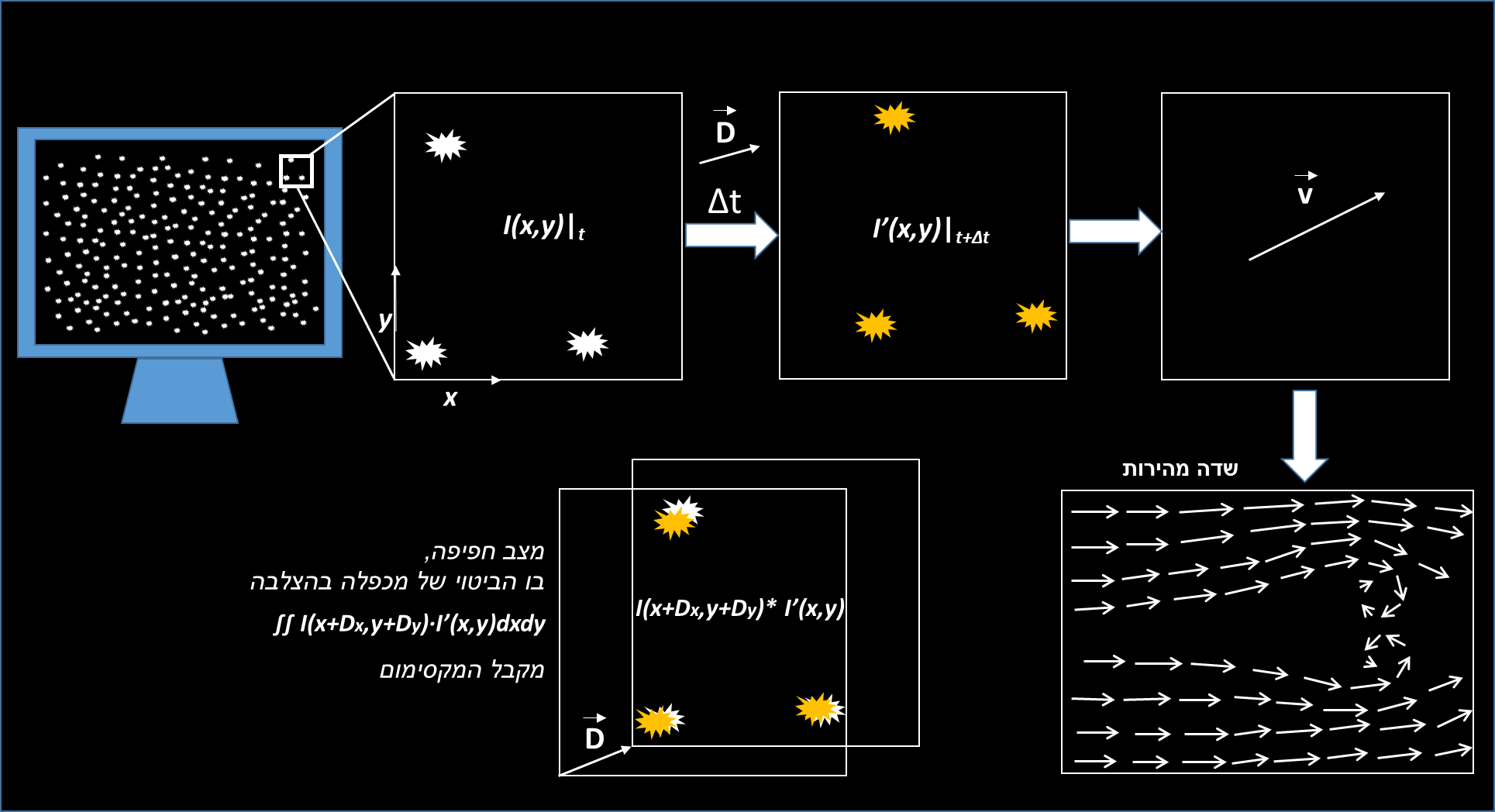 שמח עוז מישורי: שחזור שדה מהירות עי מכפלה בהצלבה